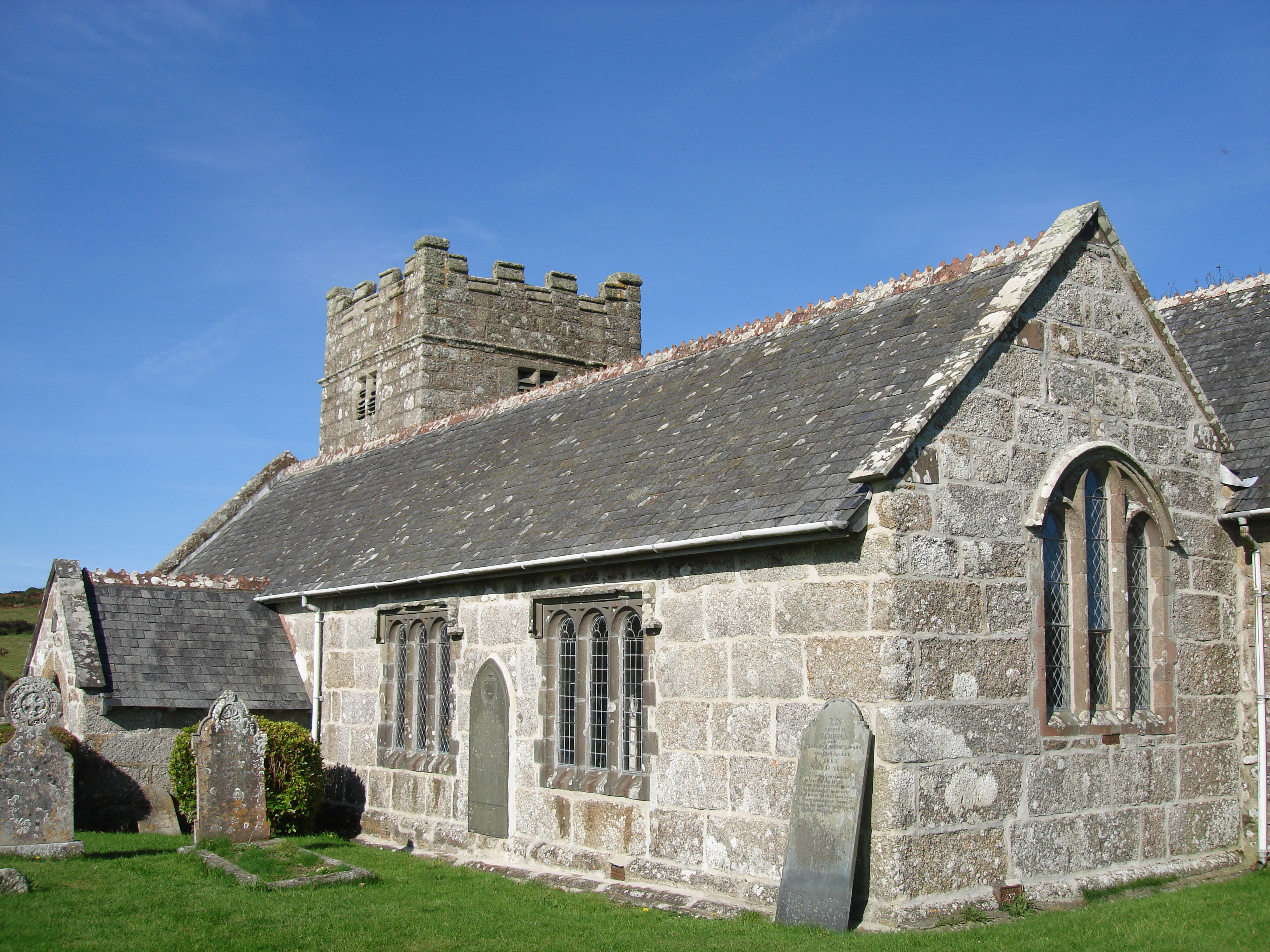 Towednack Church